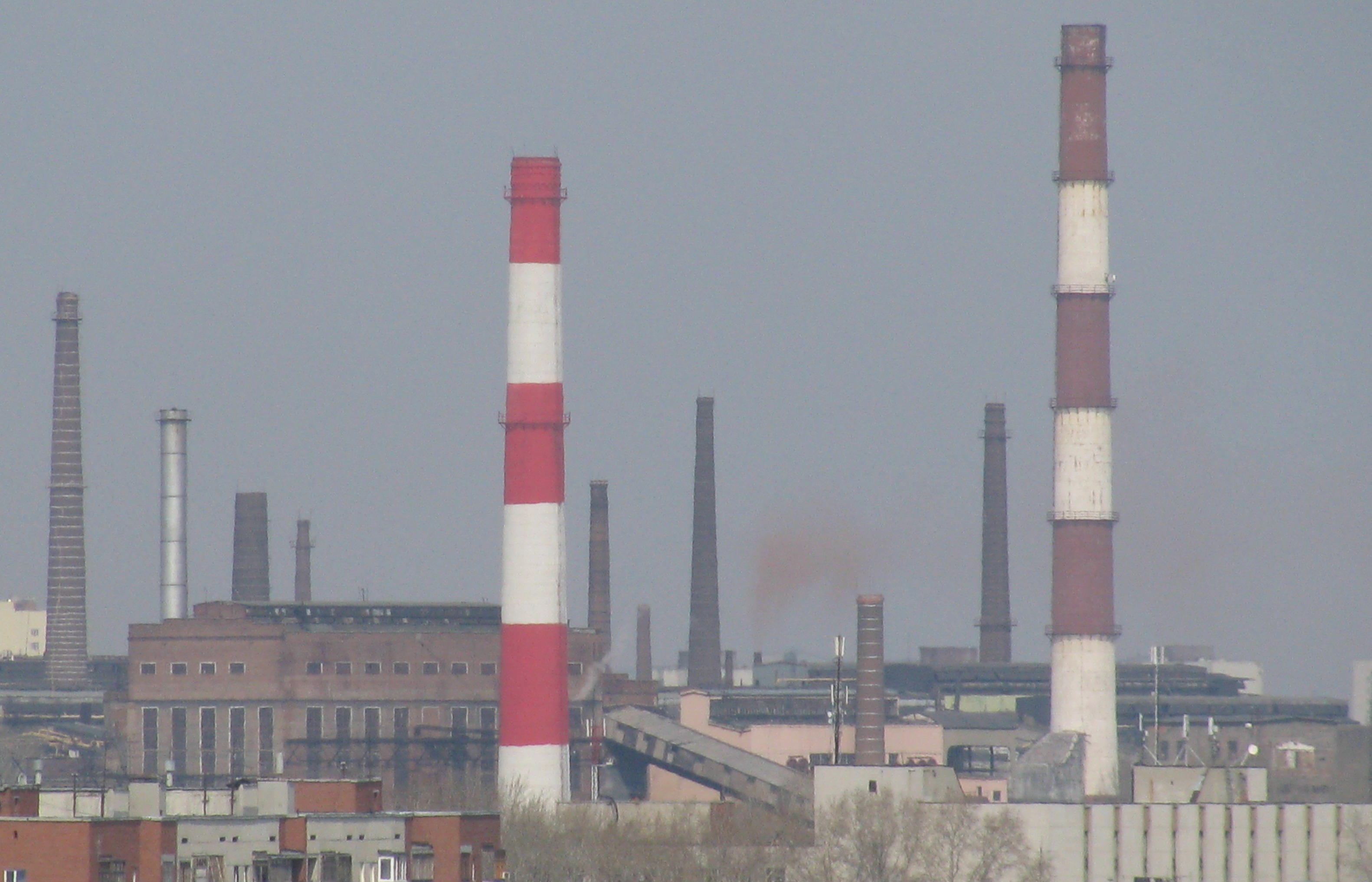 Завод